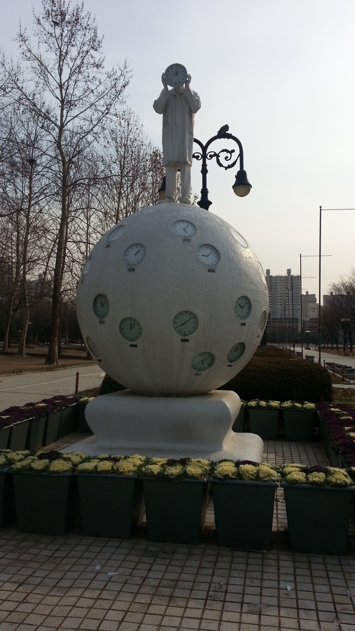 시간의파수꾼